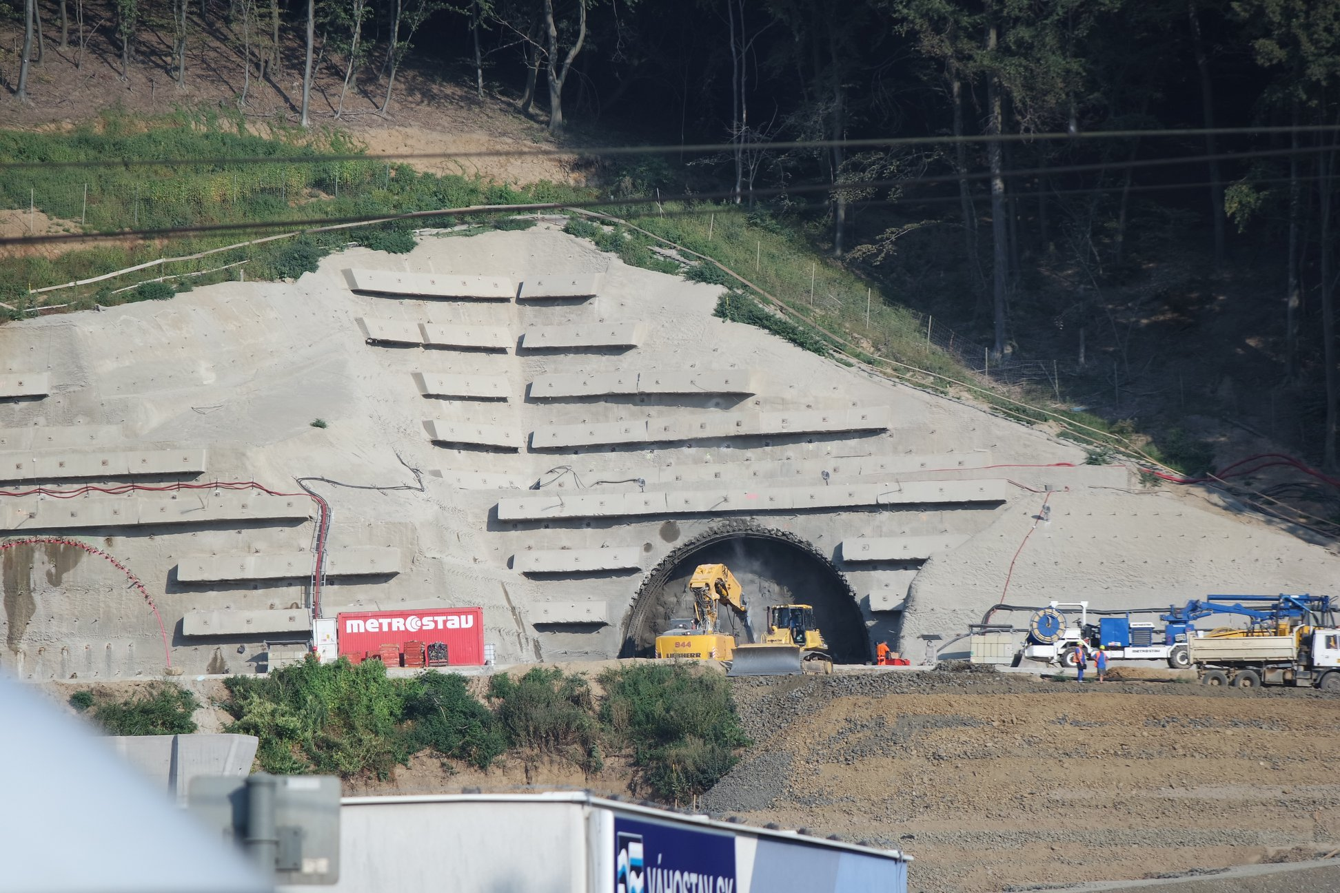 Tunel Prešov